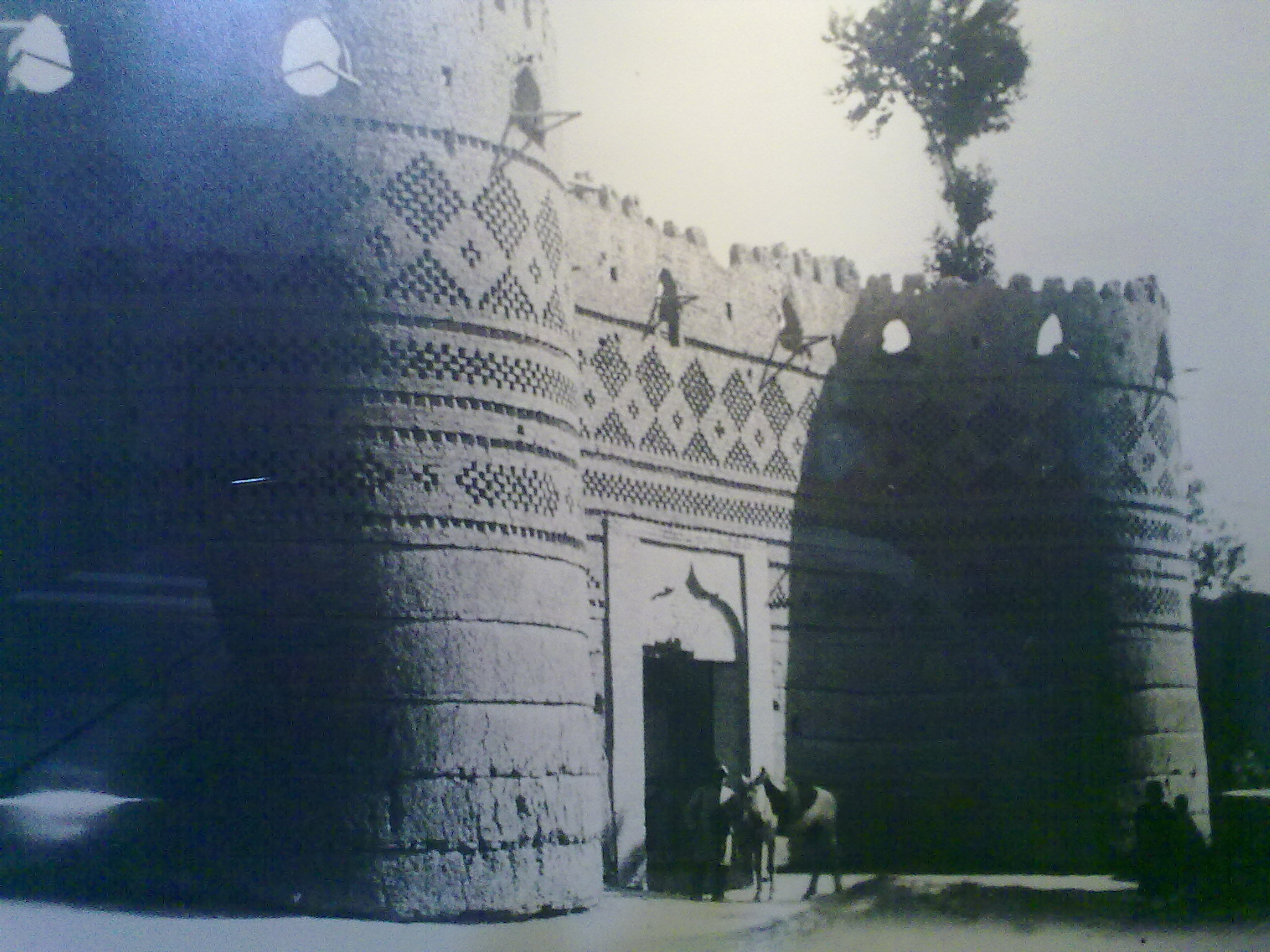 قلعه مرحوم آقا خان محلاتی